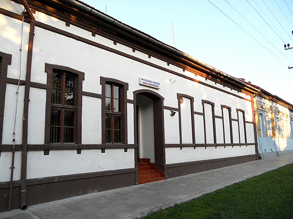 Galerija Zuzke Medvedjove u Bačkom Petrovcu